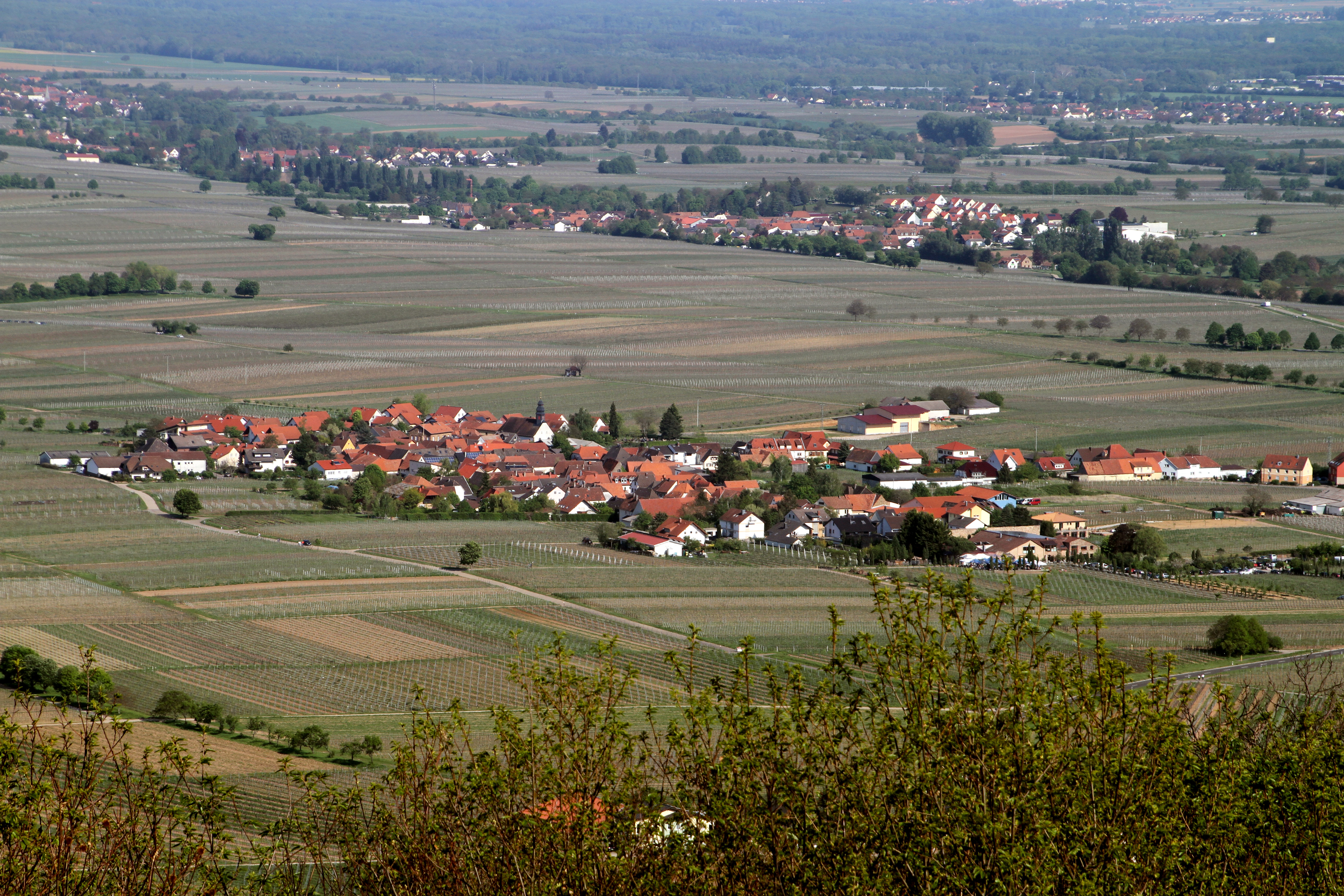 Aussicht von St.-Anna-Kapelle (Burrweiler)